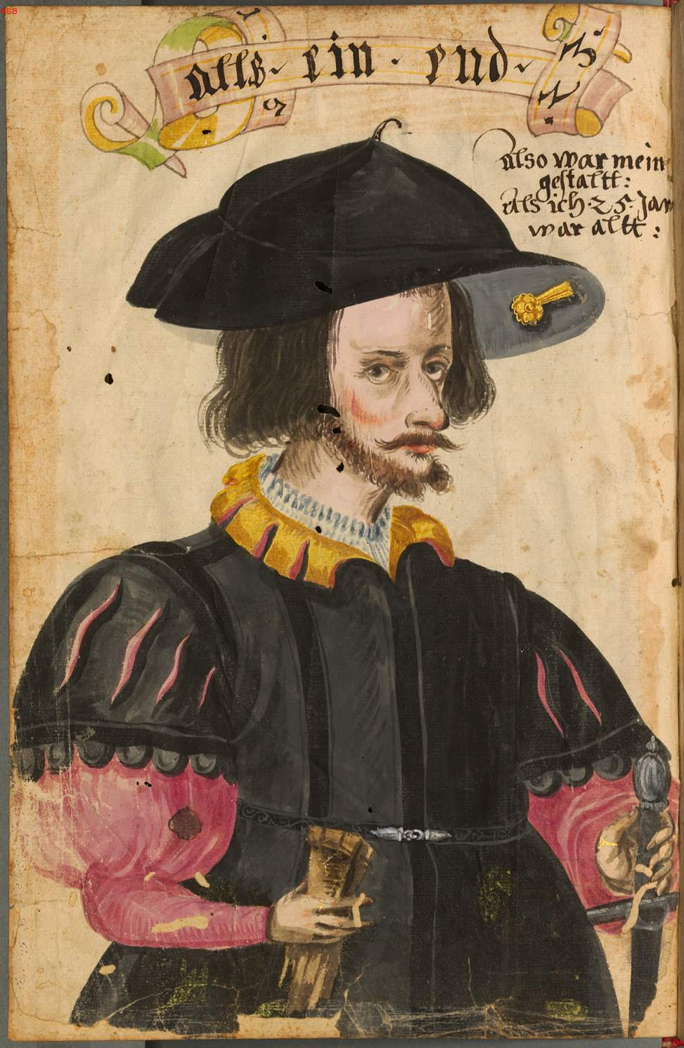 Nicht ganz ernst gemeintes Selbstportrait von Christoph Weiditz, Text: Also war mein Gestalt als ich 25 Jahr war alt.